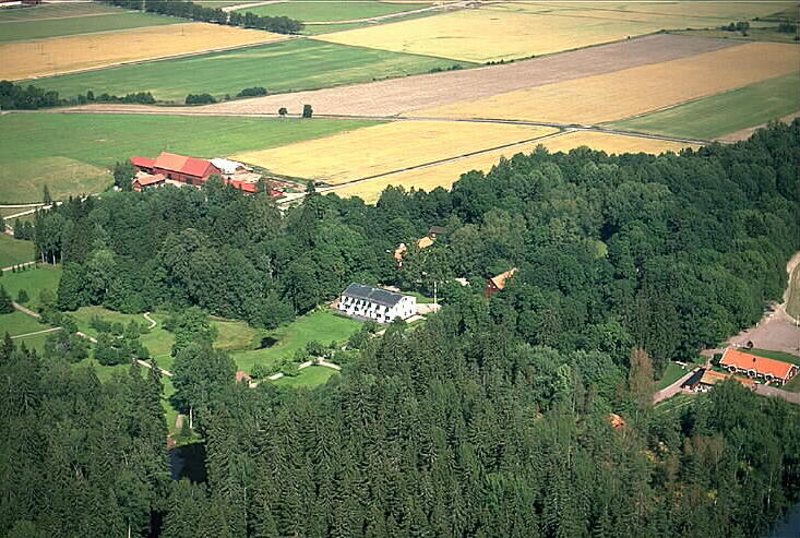 Motiv: Apertin Nyckelord: Byggnadsminnen, Flygbilder, Riksintressen Kategori: Herrgårds-/slottslandskap Apertin